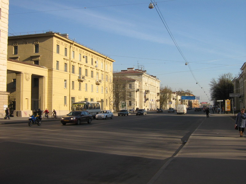 Проспект Энгельса (Санкт-Петербург)